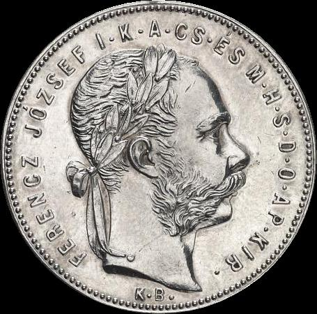 1 forint 1878 (Selmecbánya) - obverse